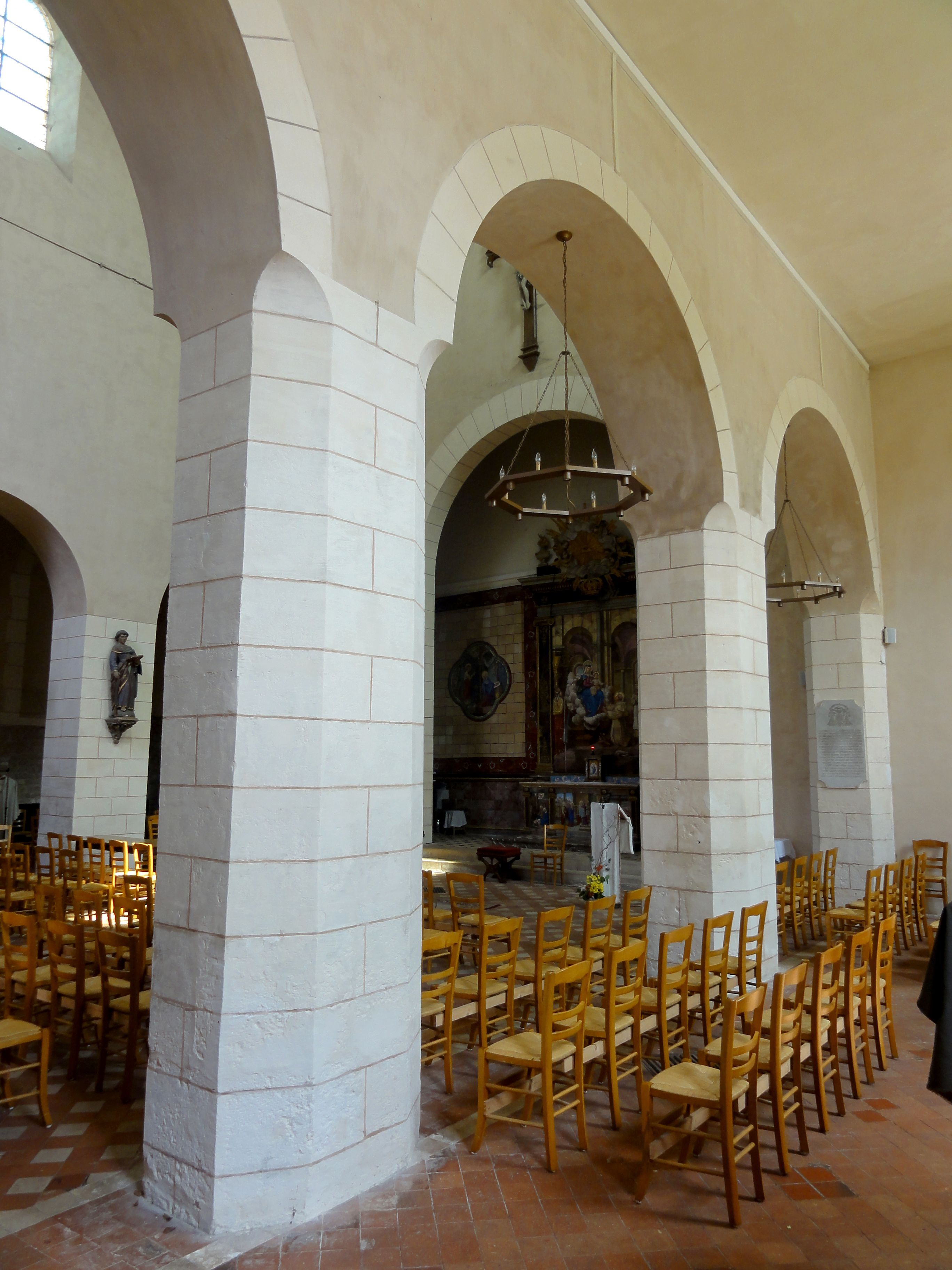 Bas-côté sud, grandes arcades.